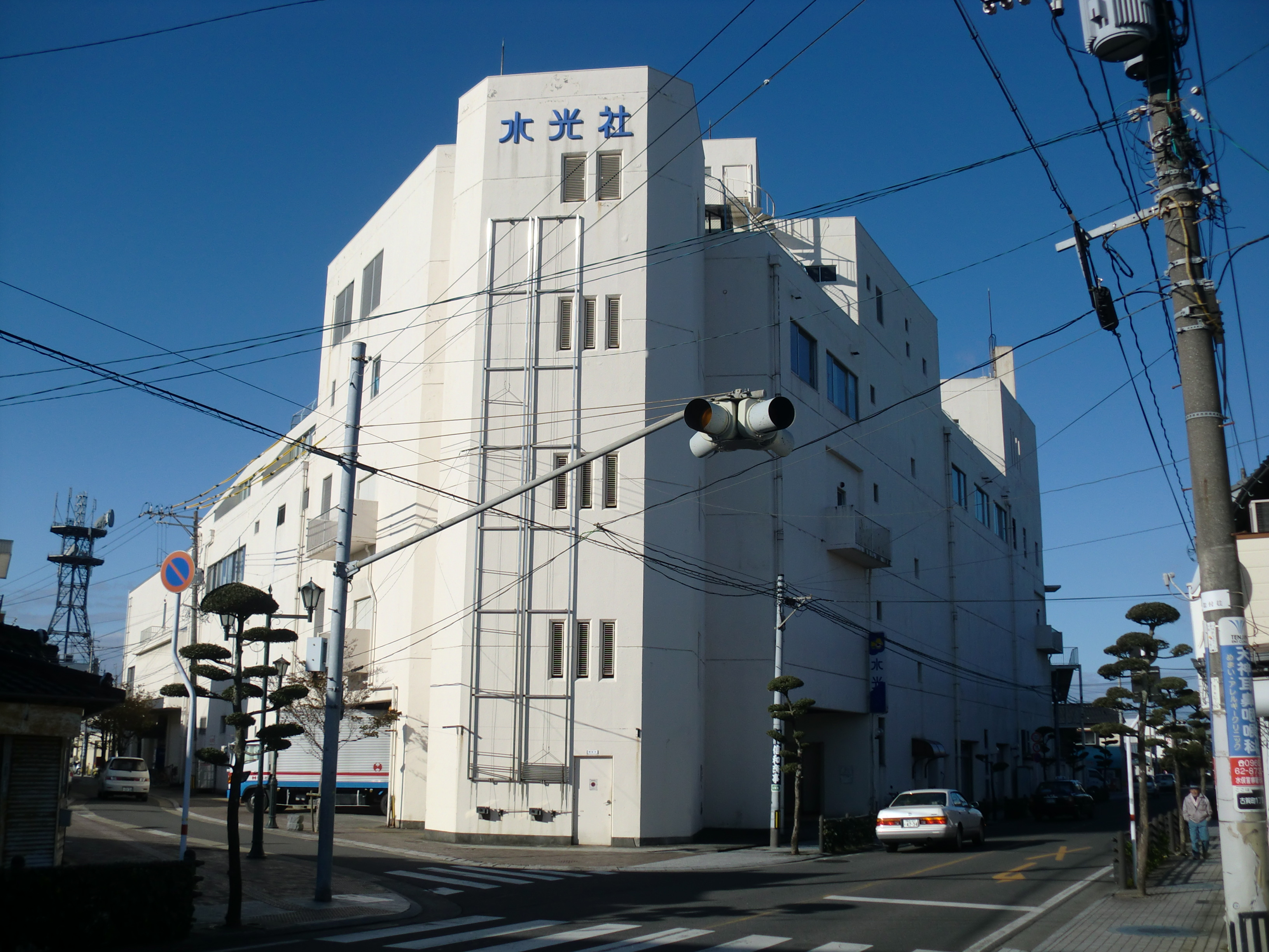 水光社本店